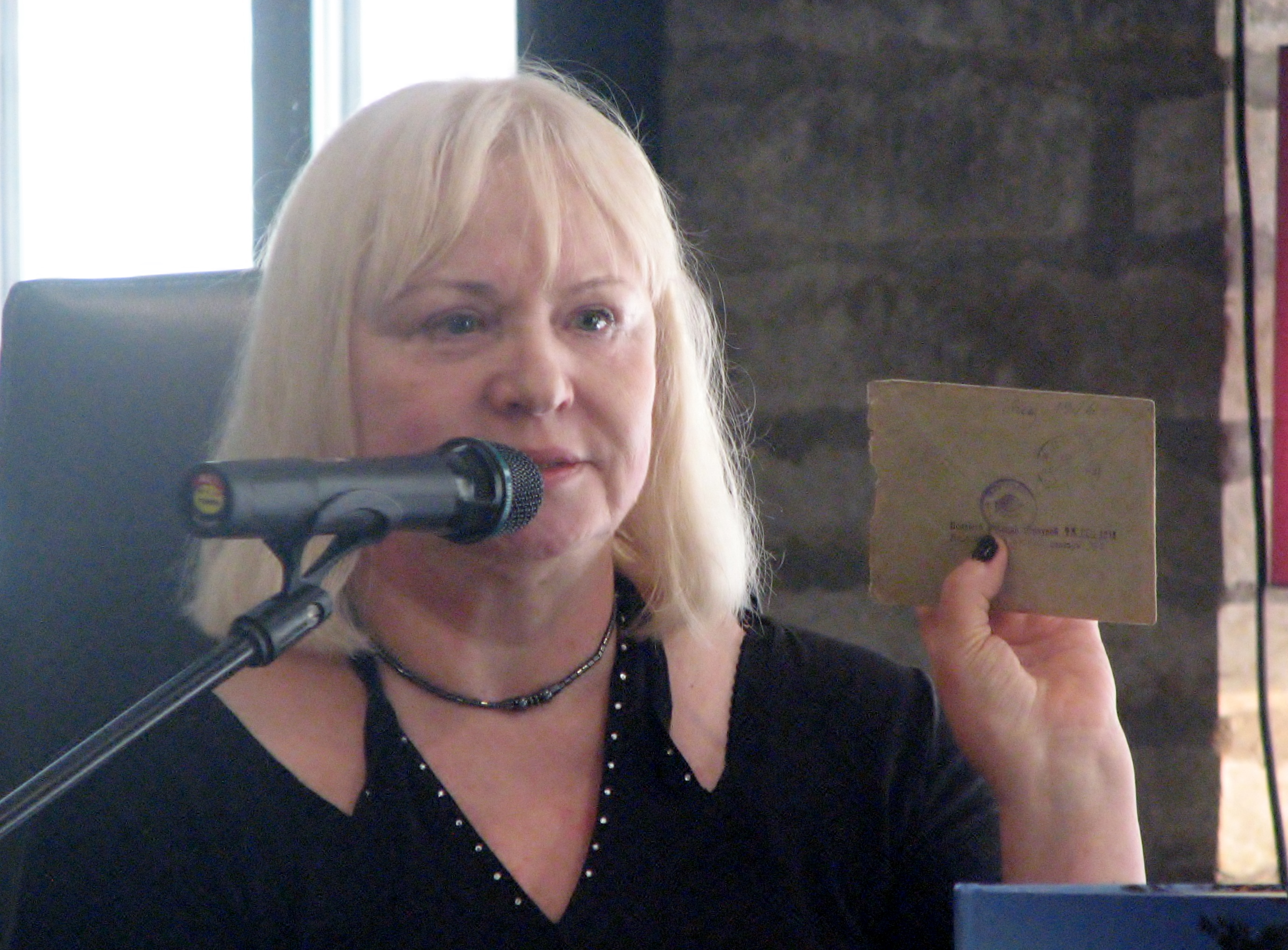 Aama Elwe-Oja näitamas originaaldokumente oma raamatu "Kuhu ma lähen, mu järv?" tutvustusel Tallinna raamatumessil